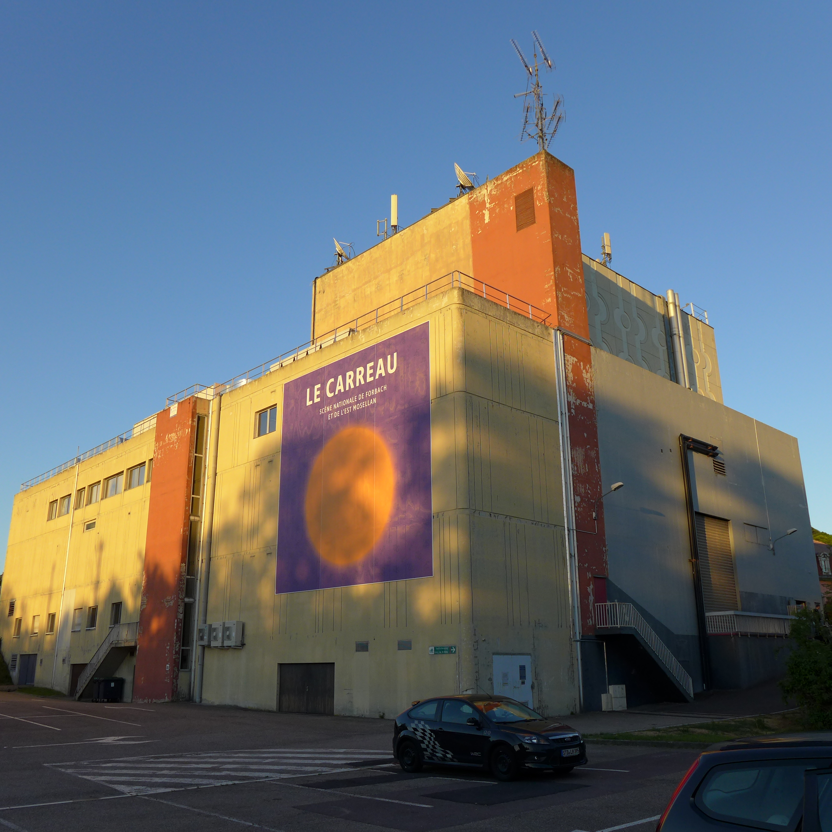 Forbach, Inneres der Stadthalle "Le Carreau"